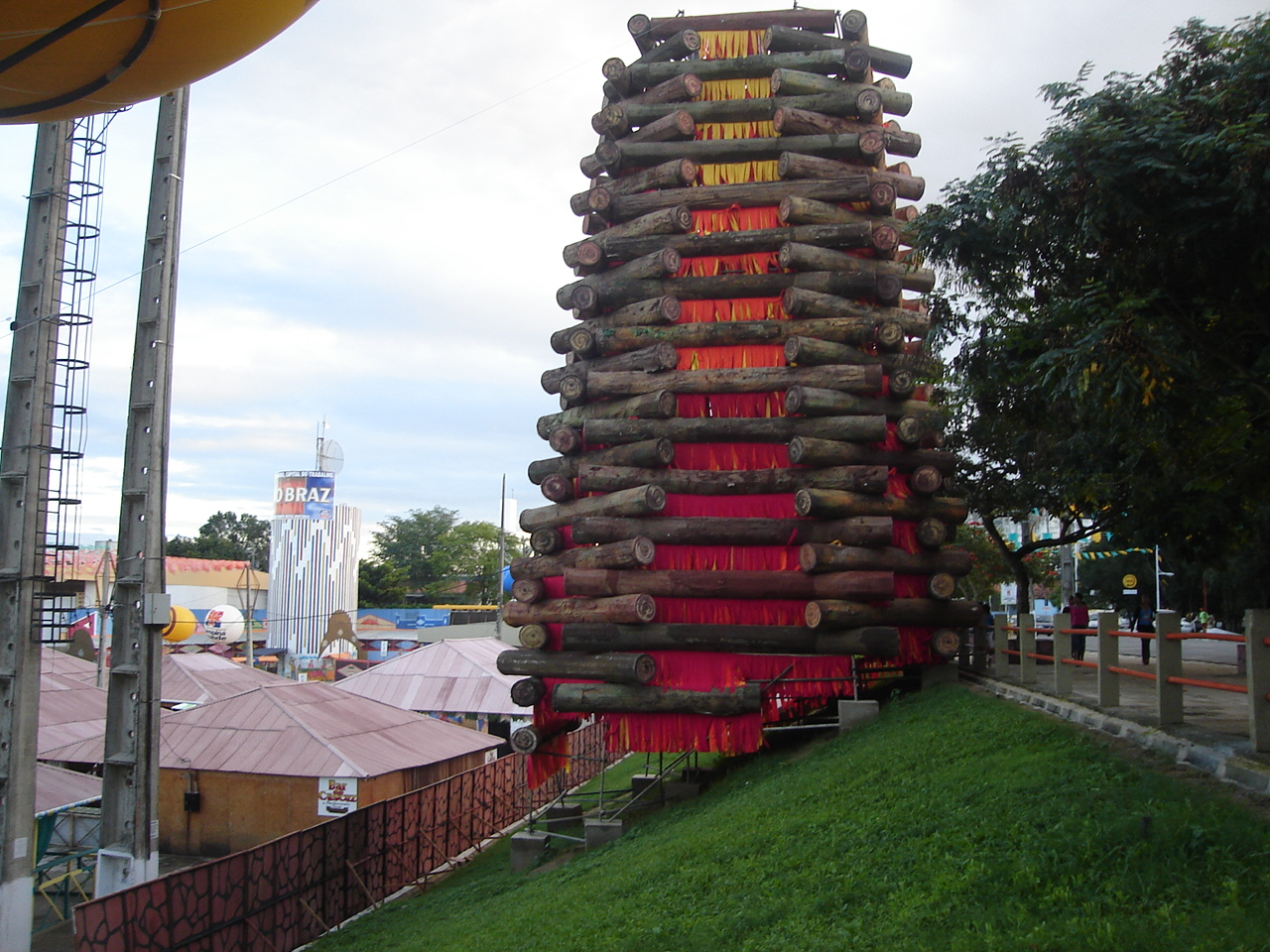 Fogueira Cenográfica do evento O Maior Sao João do Mundo, Campina Grande - PB Ano: 2006. Author: Bruno Coitinho Araújo